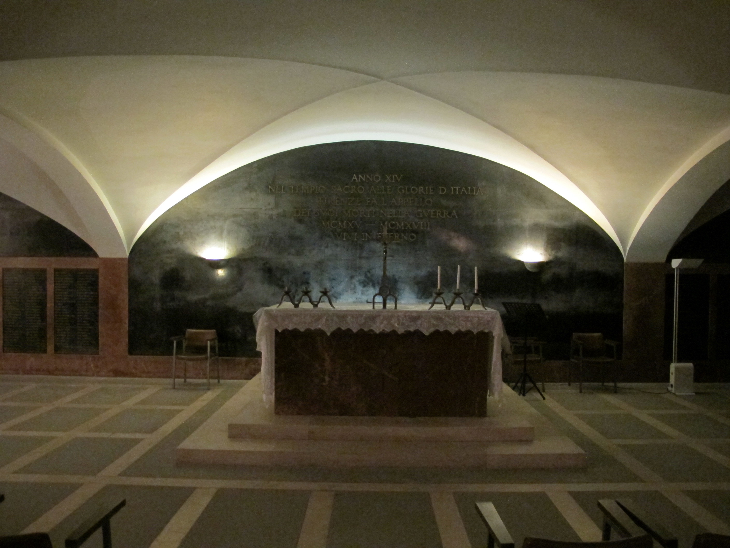 Famedio di santa croce, candelabro